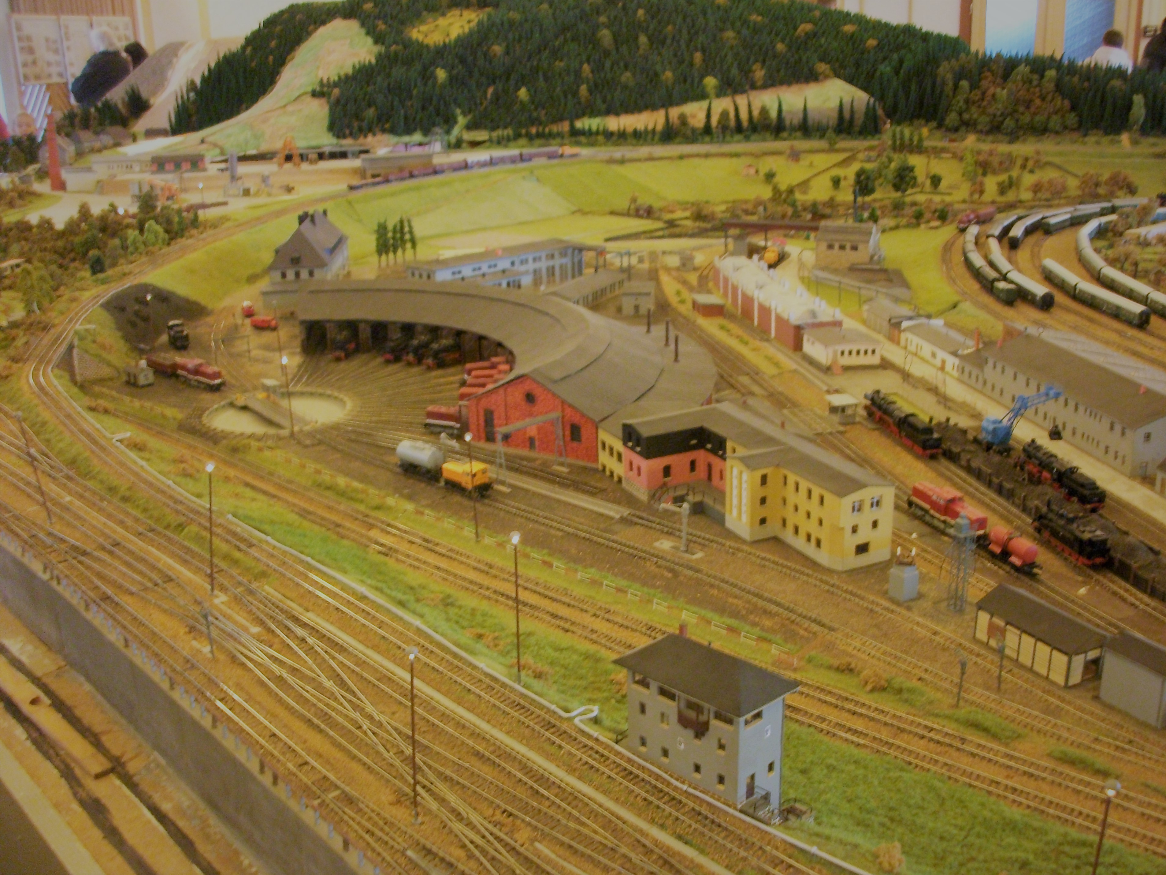 BW des Bahnhofs Aue (Sachs) in Miniatur